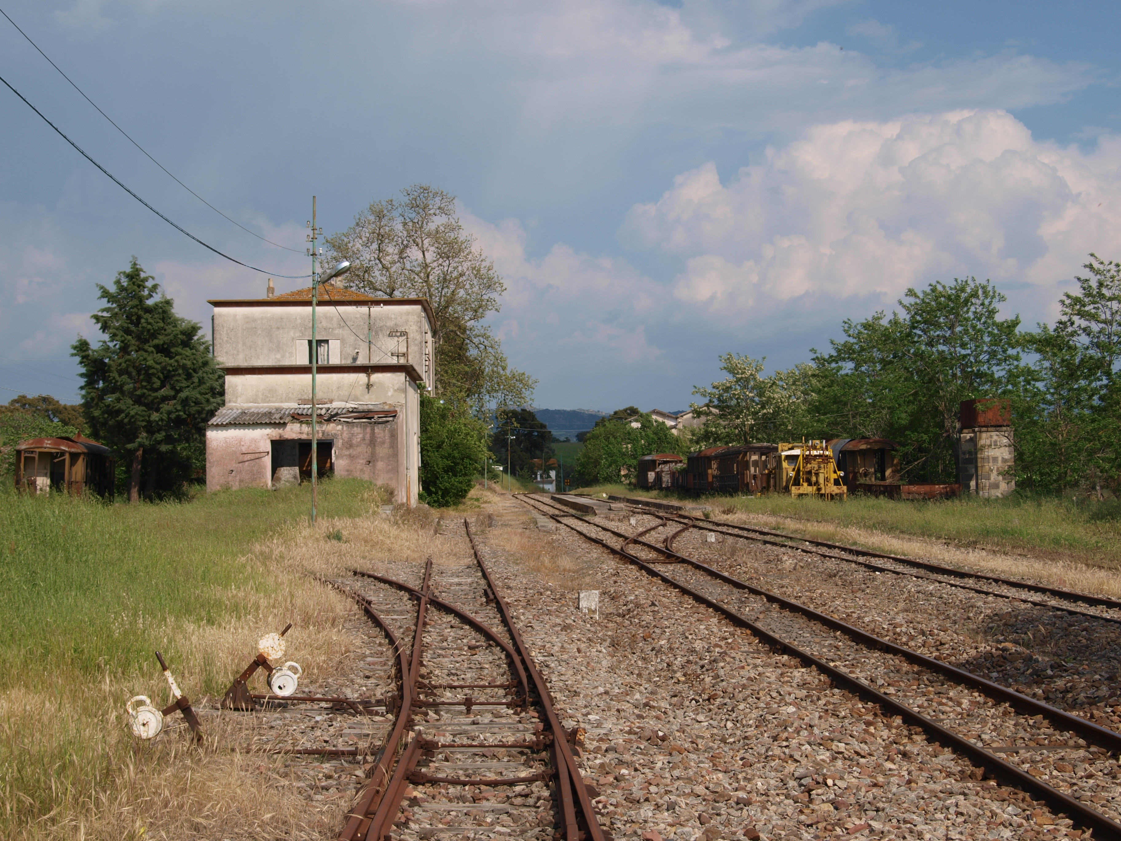 Bahnhof Tirso mit abgestellten Fahrzeugen